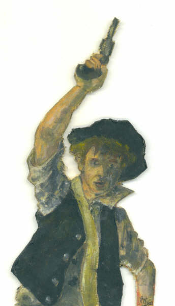 personnage de Gavroche peint par mes soins et copié du tableau La liberté guidant le peuple de Eugène Delacroix.